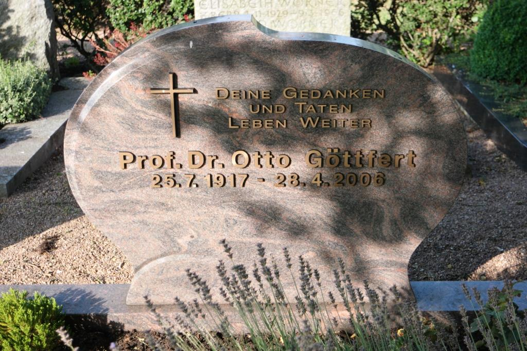 Grab des Maschinenbauers und Unternehmers Otto Göttfert (1917-2006) auf dem Friedhof in Buchen (Odenwald).